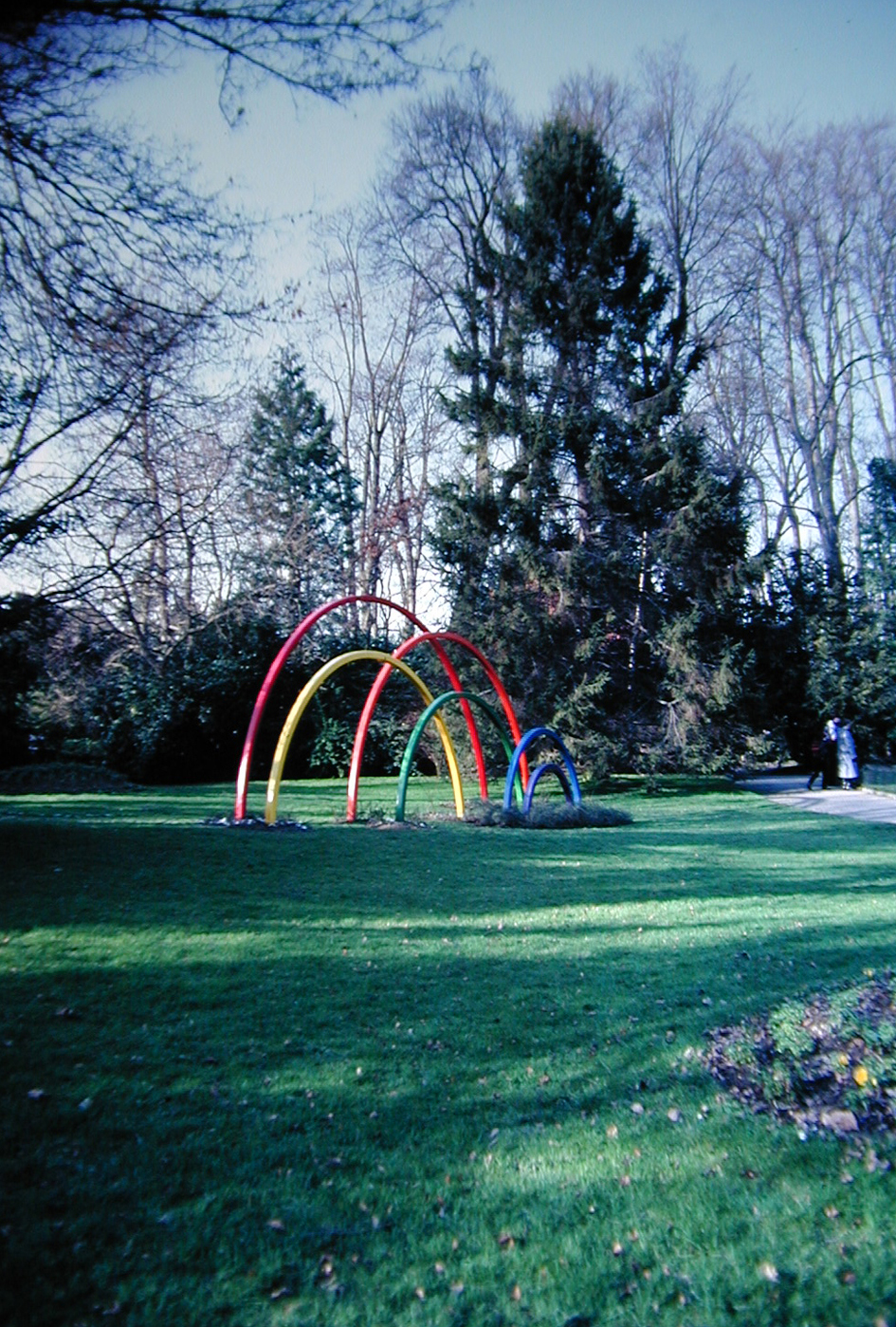 Sculpture en acier forgé et laqué 400 X 800 cm